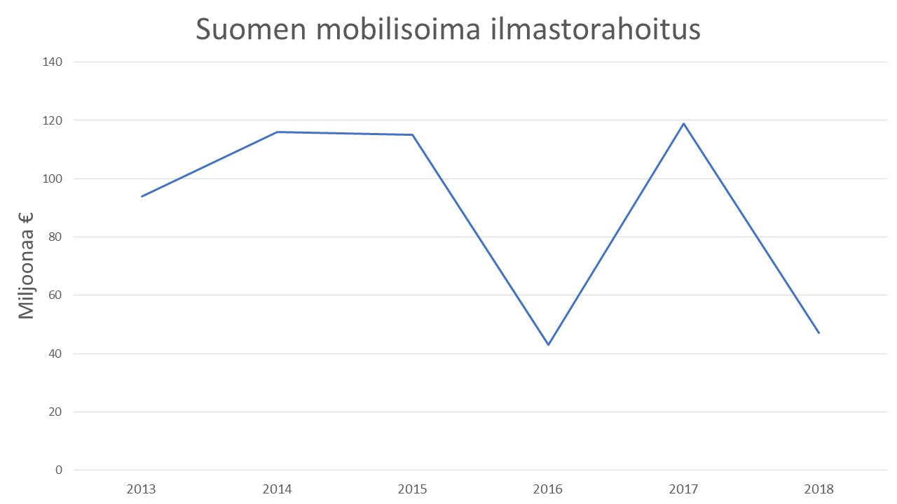 Rahoitusta koskevat tiedot perustuvat Suomen ulkoministeriön tilastoihin